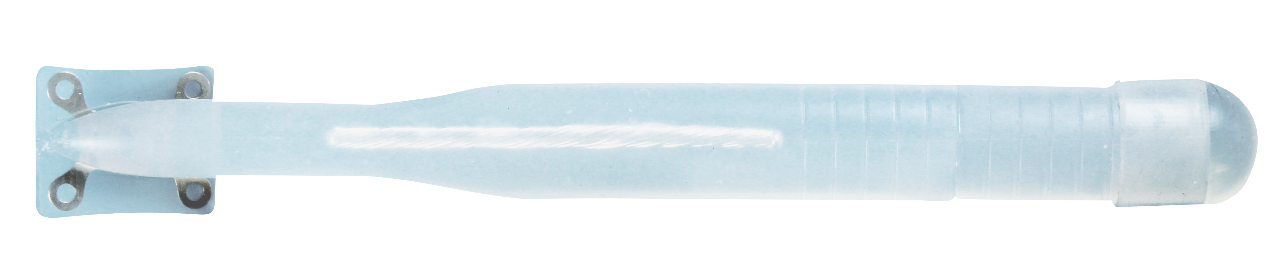 ZSI 100 FTM malleable penile implant